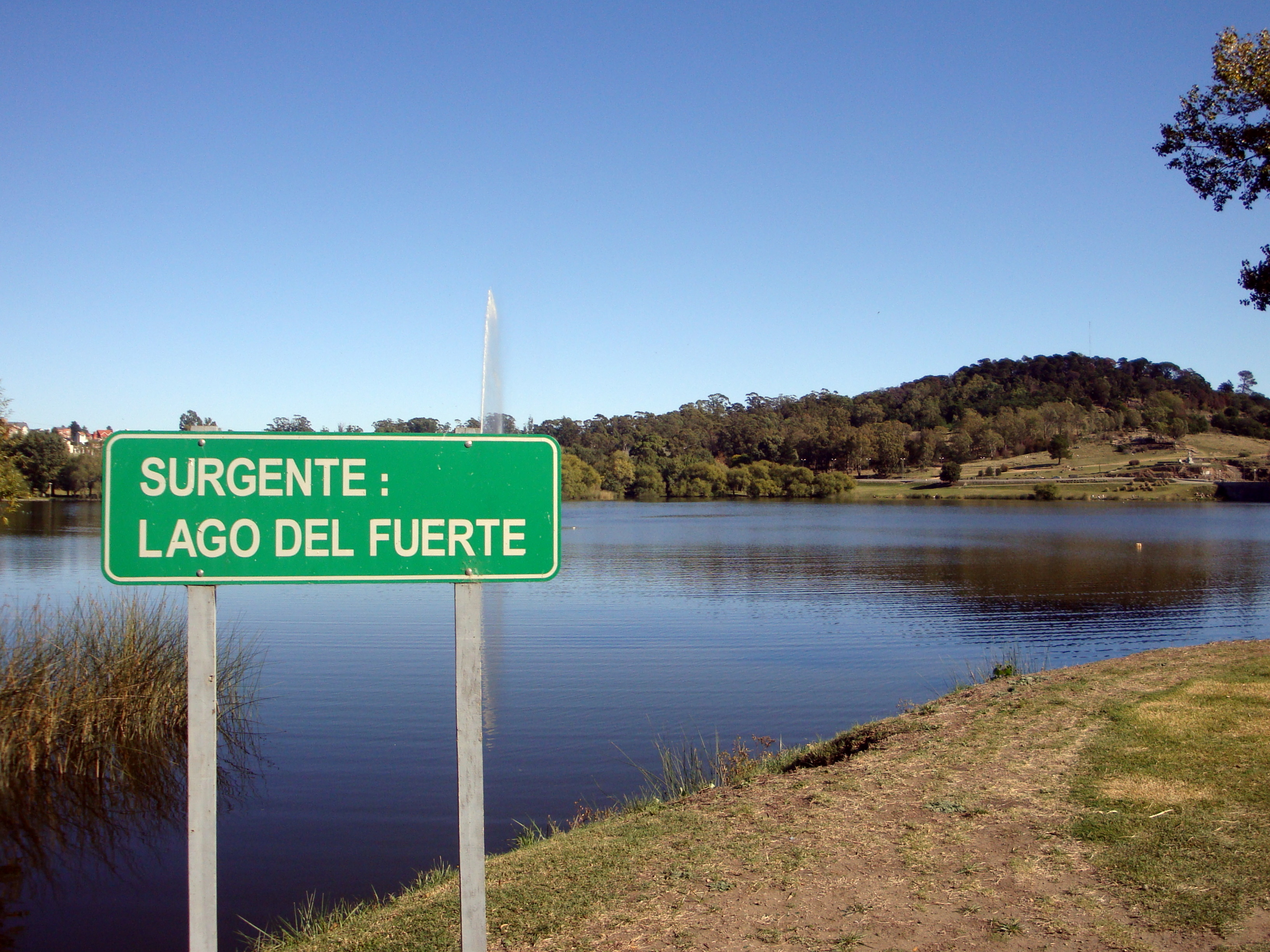 Lago del Fuerte Independencia.